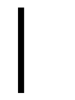 runic letter isaz